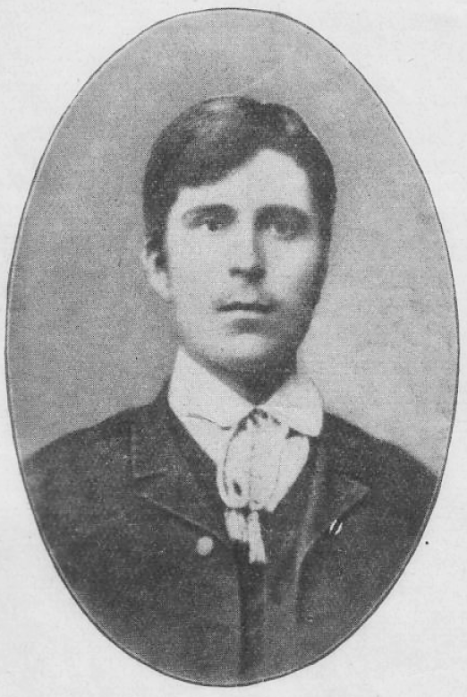 Иван Проханов в юности